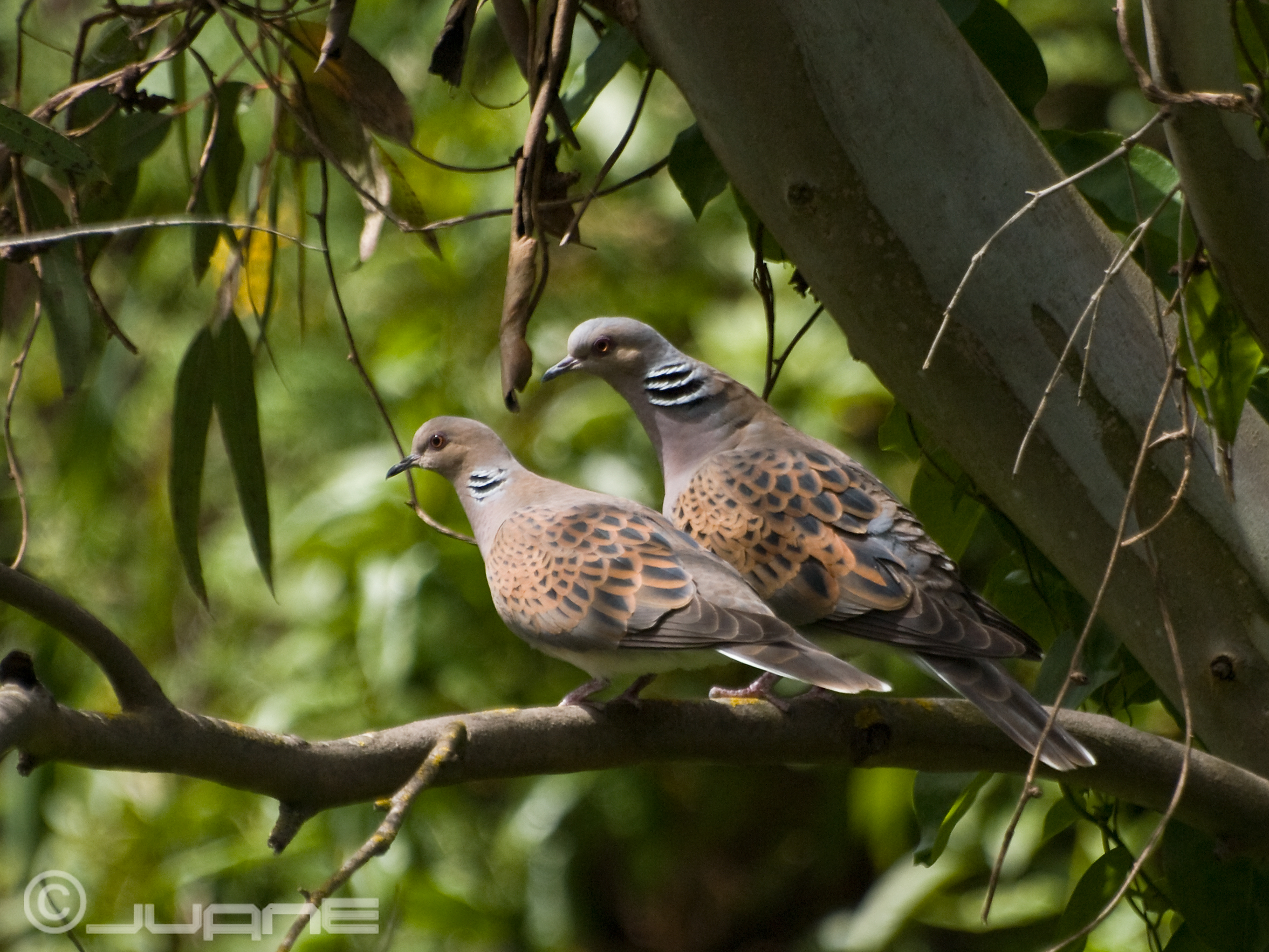 Barranco del Guiniguada, Las Palmas de Gran Canaria